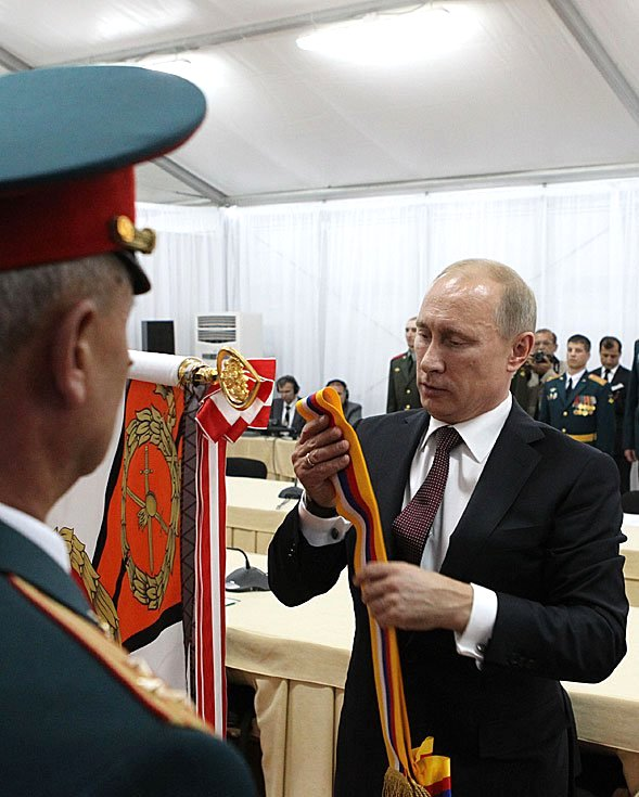 Владимир Путин и Эмомали Рахмон в расположении 201-й российской военной базы, находящейся в Таджикистане. Вручение ордена Жукова